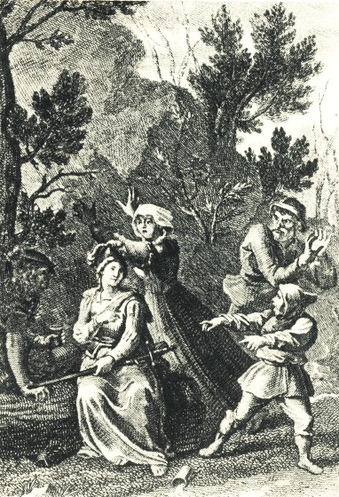 Friedrich Schiller: Die Jungfrau von Orléans. Fünfter Akt, 3. Aufzug.